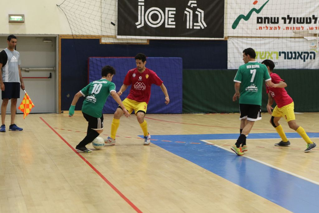 גמר אליפות ליגה קטרגל 2016 אריות חיפה - דולפיני אשדוד, אשדוד מנצחת 6:7 בהארכה וזוכה באליפות השנייה ברצף ובדאבל.